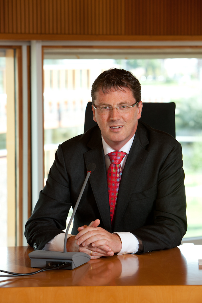 Burgemeester P.C. van den Brink.